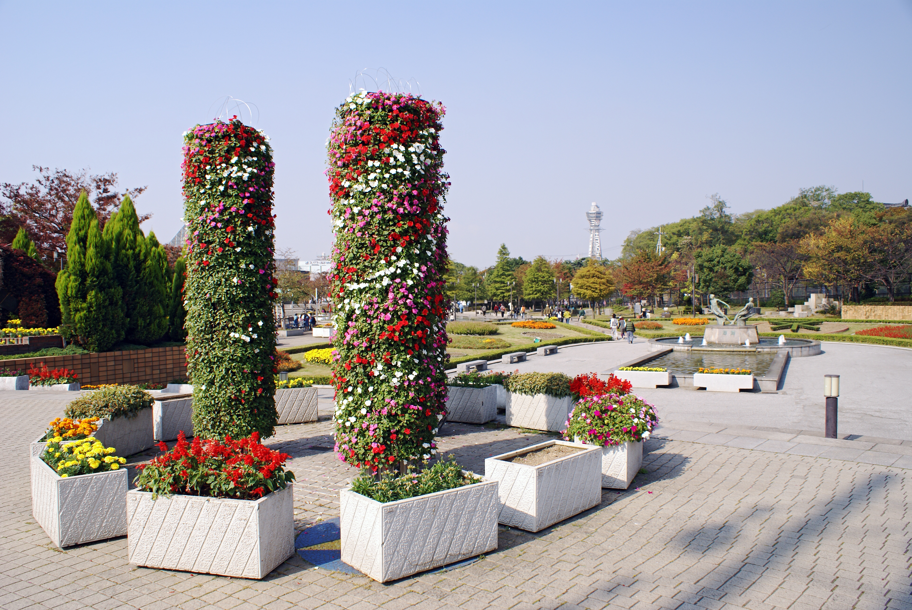 Tennoji Park in Osaka, Osaka prefecture, Japan